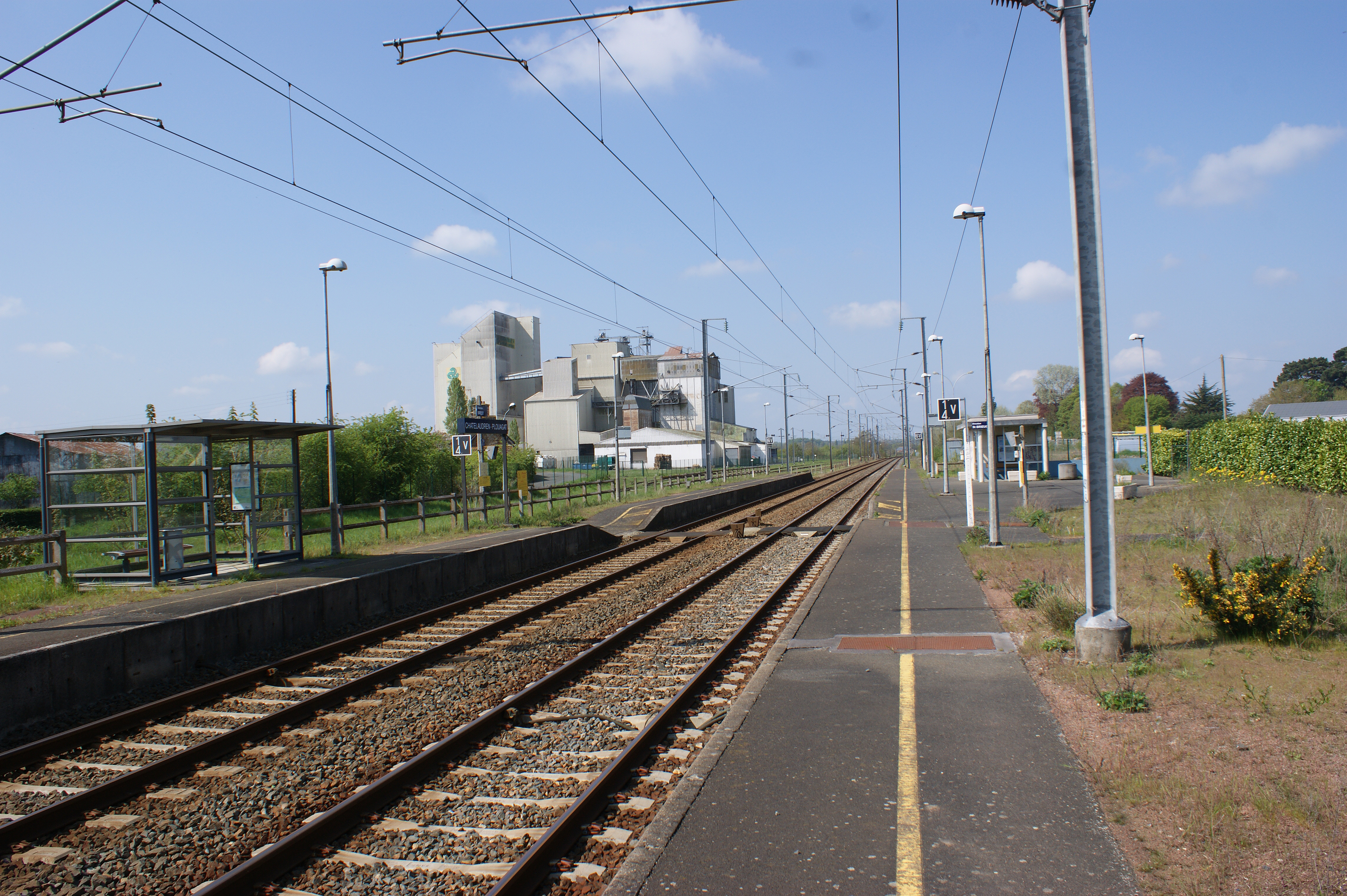 Gare de Châtelaudren - Plouagat, vue de la halte vers Guingamp (orientation plutôt est-ouest, ombre et position de l'usine par-rapport à la halte).